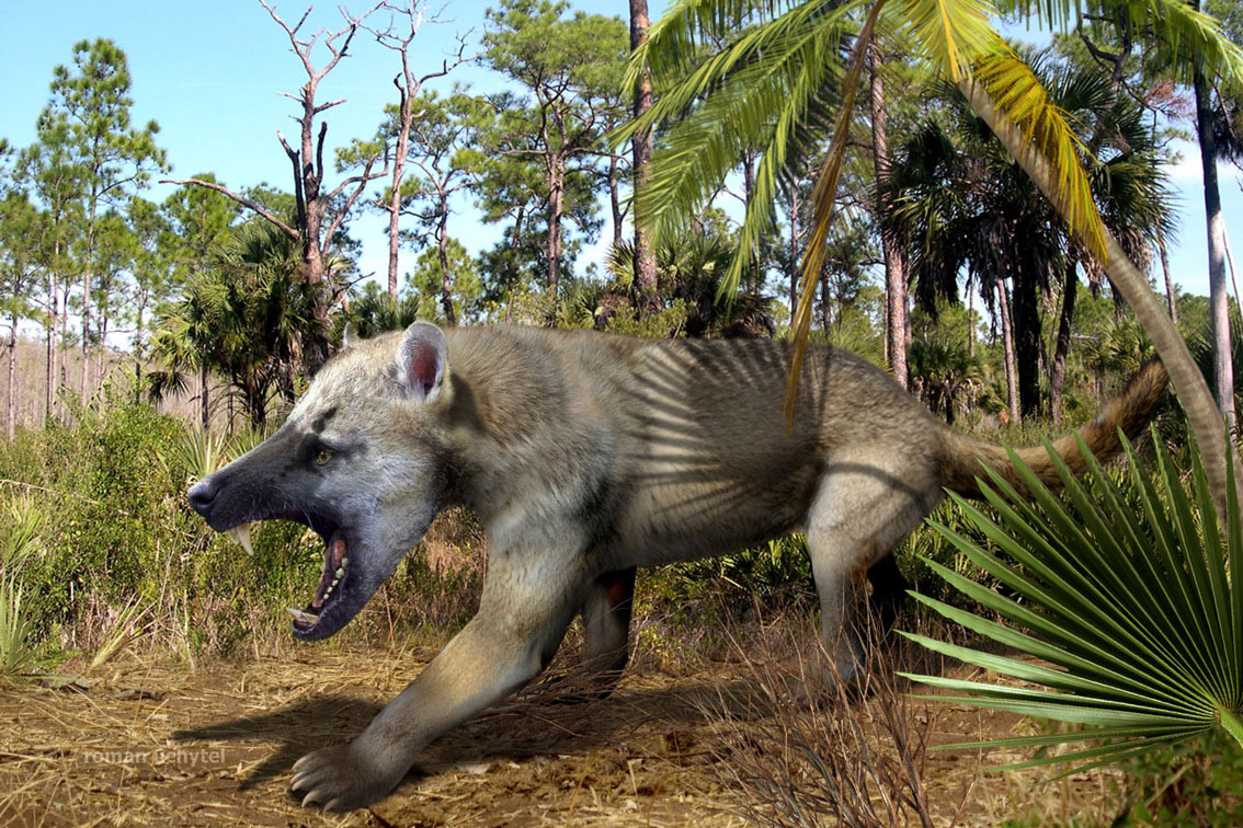 Amphicyon ingens / собакомедведь